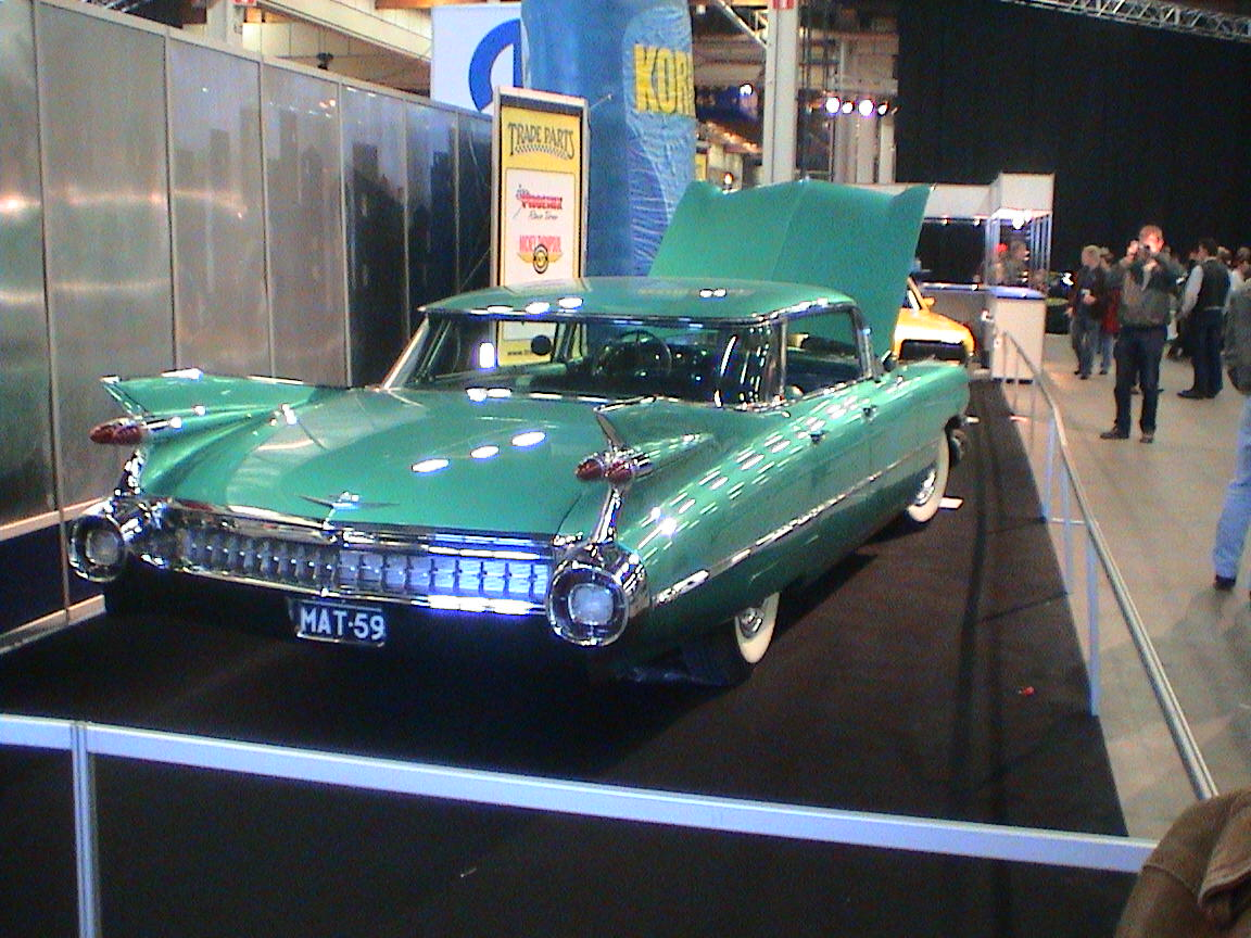 1959 Cadillac Series 59-62 Sedan De Ville